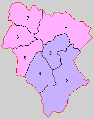 大分県玖珠郡の町村制時点の町村。